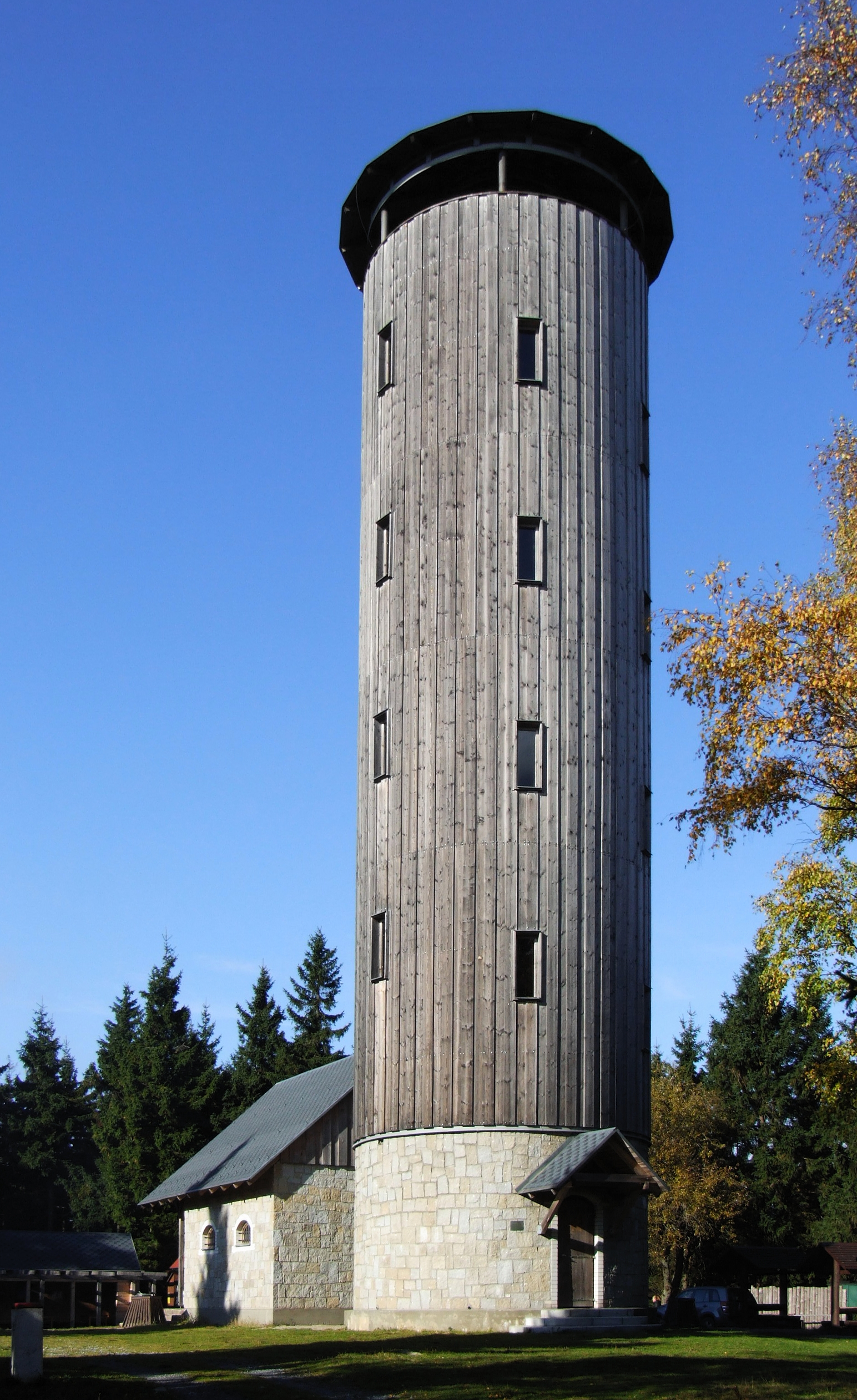 Rozhledna na Borůvkové hoře (Rychlebské hory)